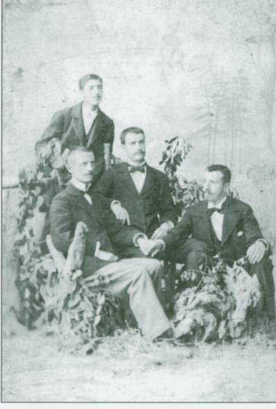 Учители от Скопското педагогическо училище - Тодор Паскалев, Христо Николов, дякон Неофит Пасков, Коста Николов (седналият вляво на първия ред). Скопие, 7 юли 1900 г.